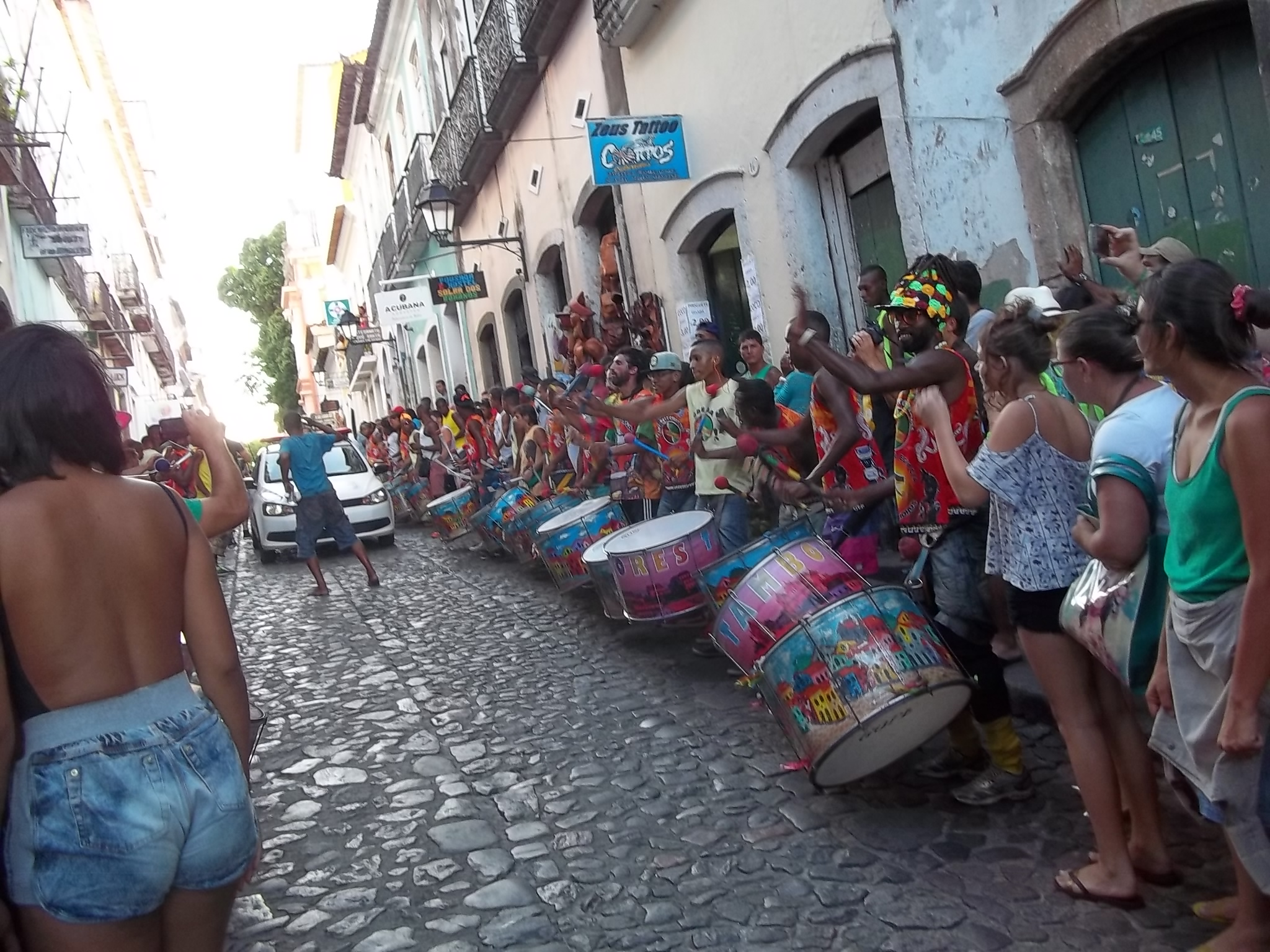 Ensayo de un bloco (bloque) para el próximo carnaval de Salvador de Bahía.